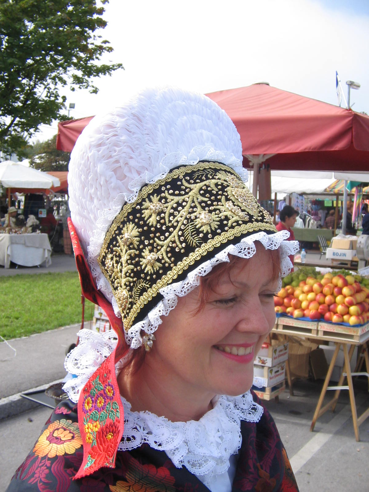 Avba, praznično pokrivalo iz Gorenjske, Slovenija